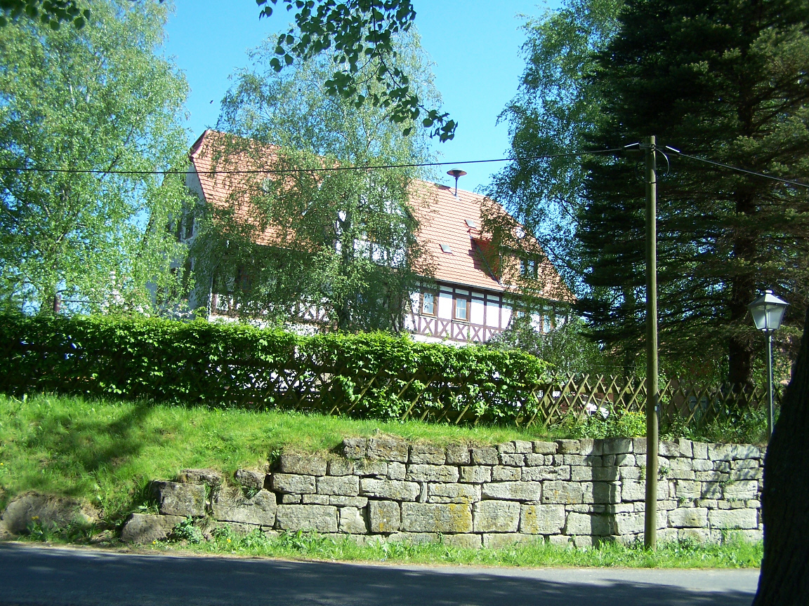 Schloss Berteroda, Südansicht mit Mauerresten